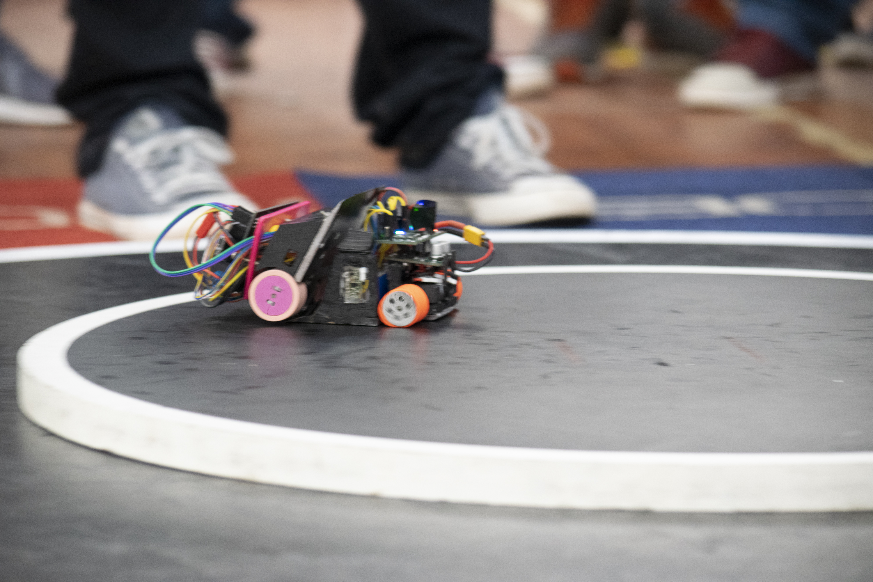 Disputa de mini-sumo (ThundeRatz)